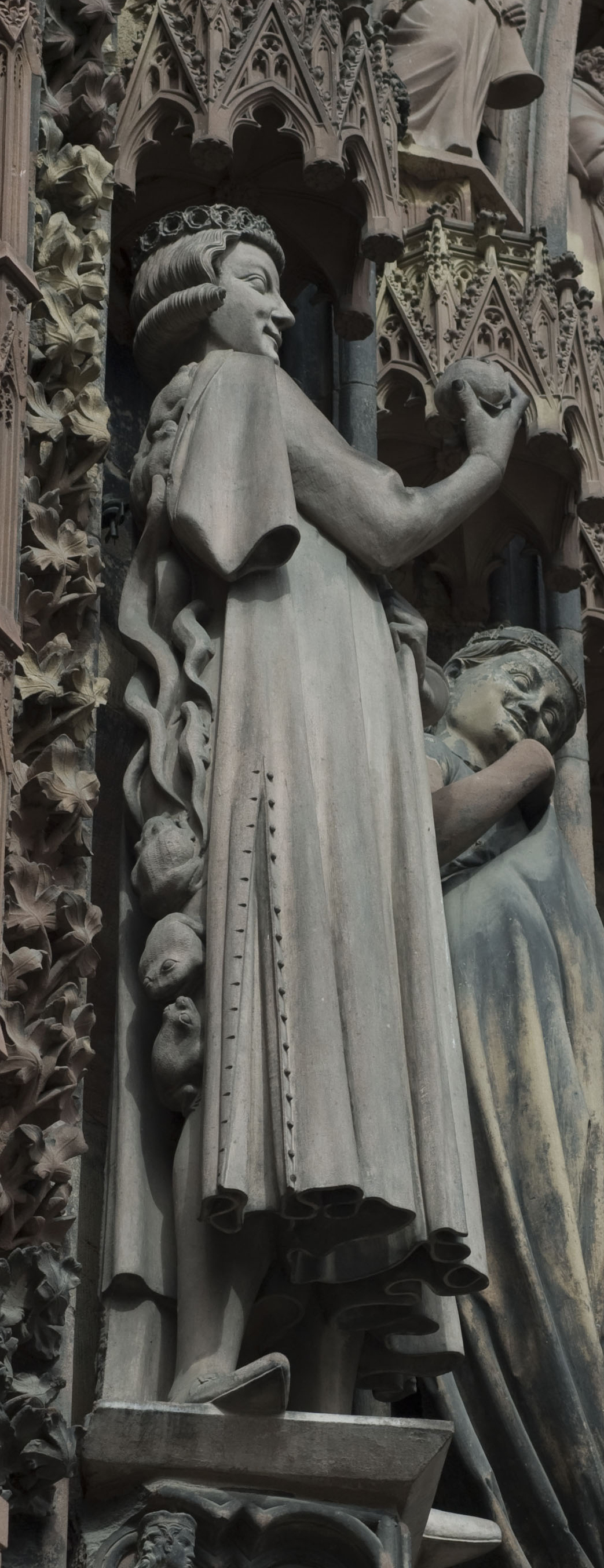 Le tentateur (vue de dos)